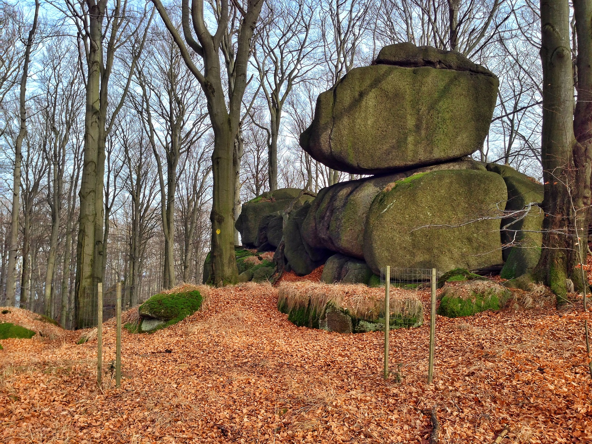 Vrcholová skála na Stržovém vrchu (710 m) v Jizerských horách